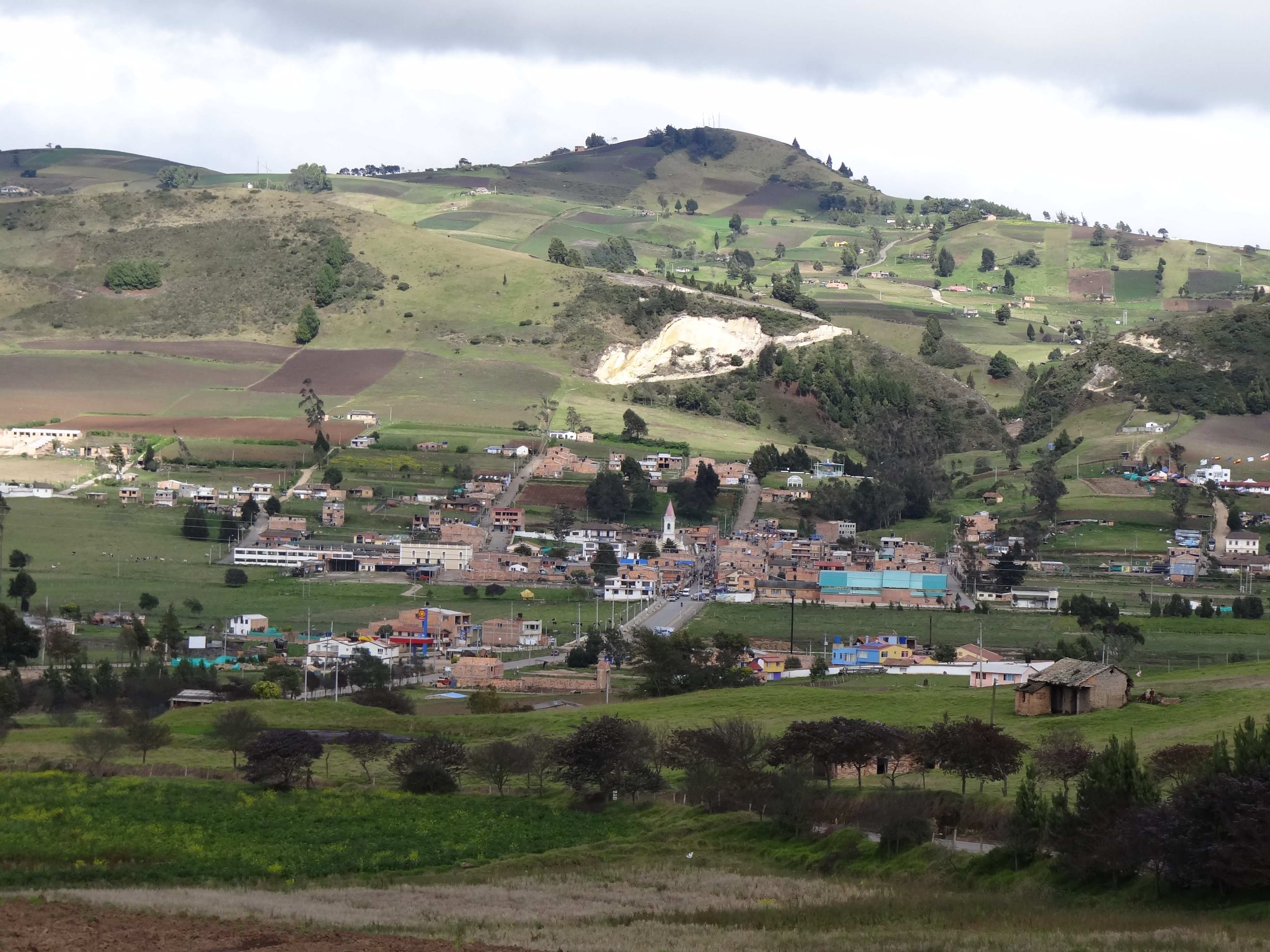 Centro urbano, municipio de Soracá, departamento de Boyacá, Colombia.